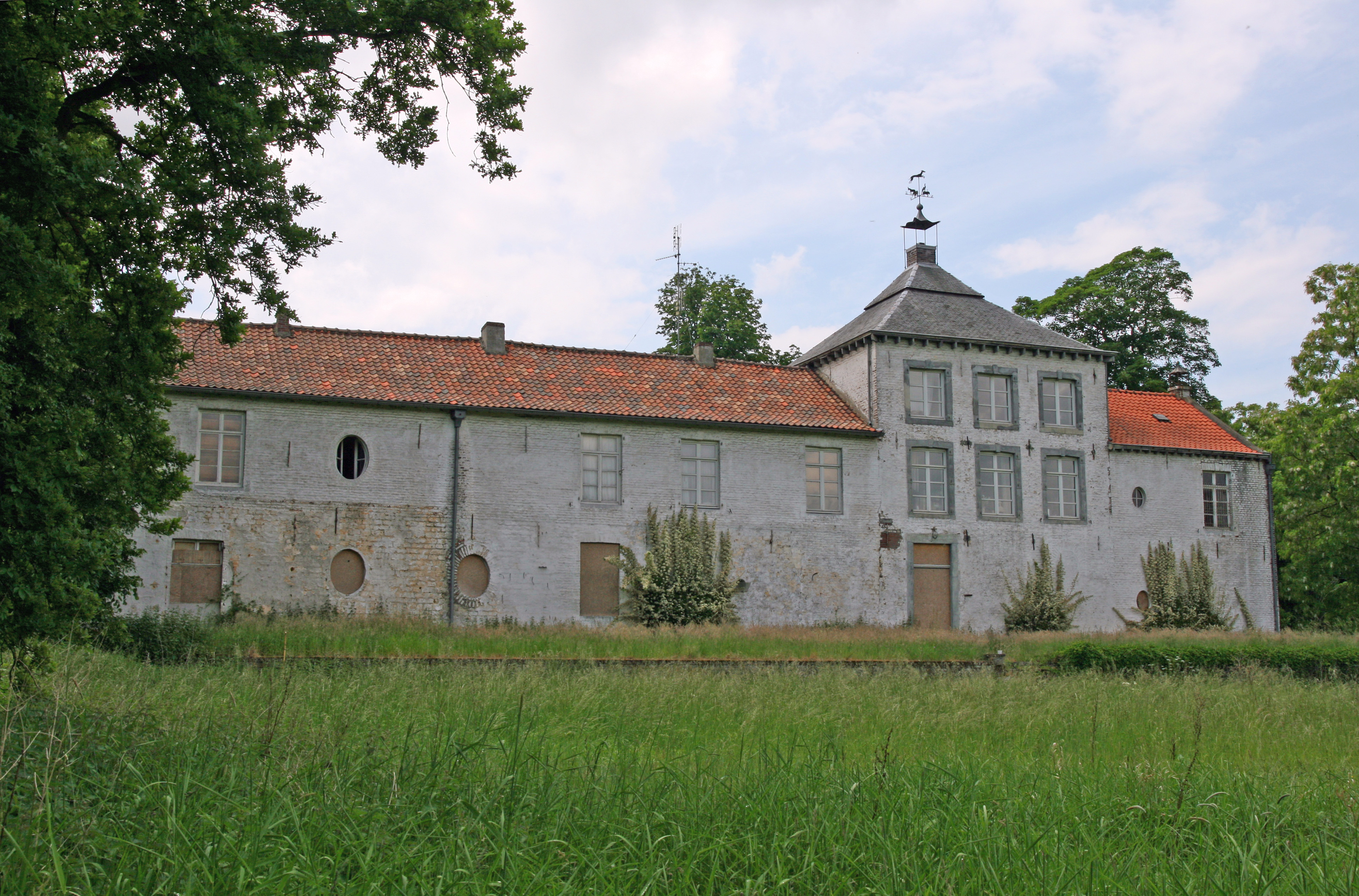 Vervallen landgoed Hoosden